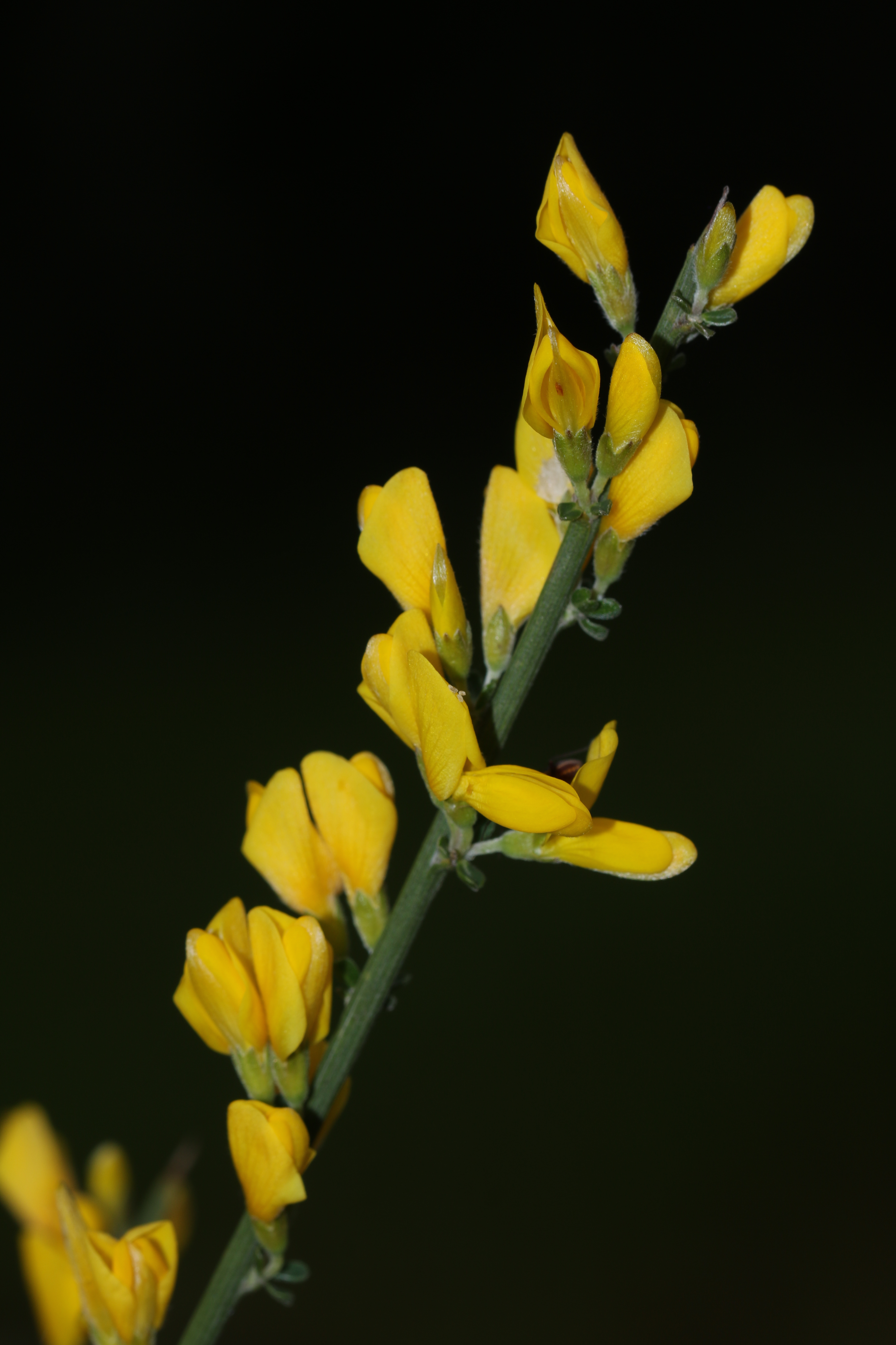 Genista Polyanthos. Aulaga Brava (detalle)